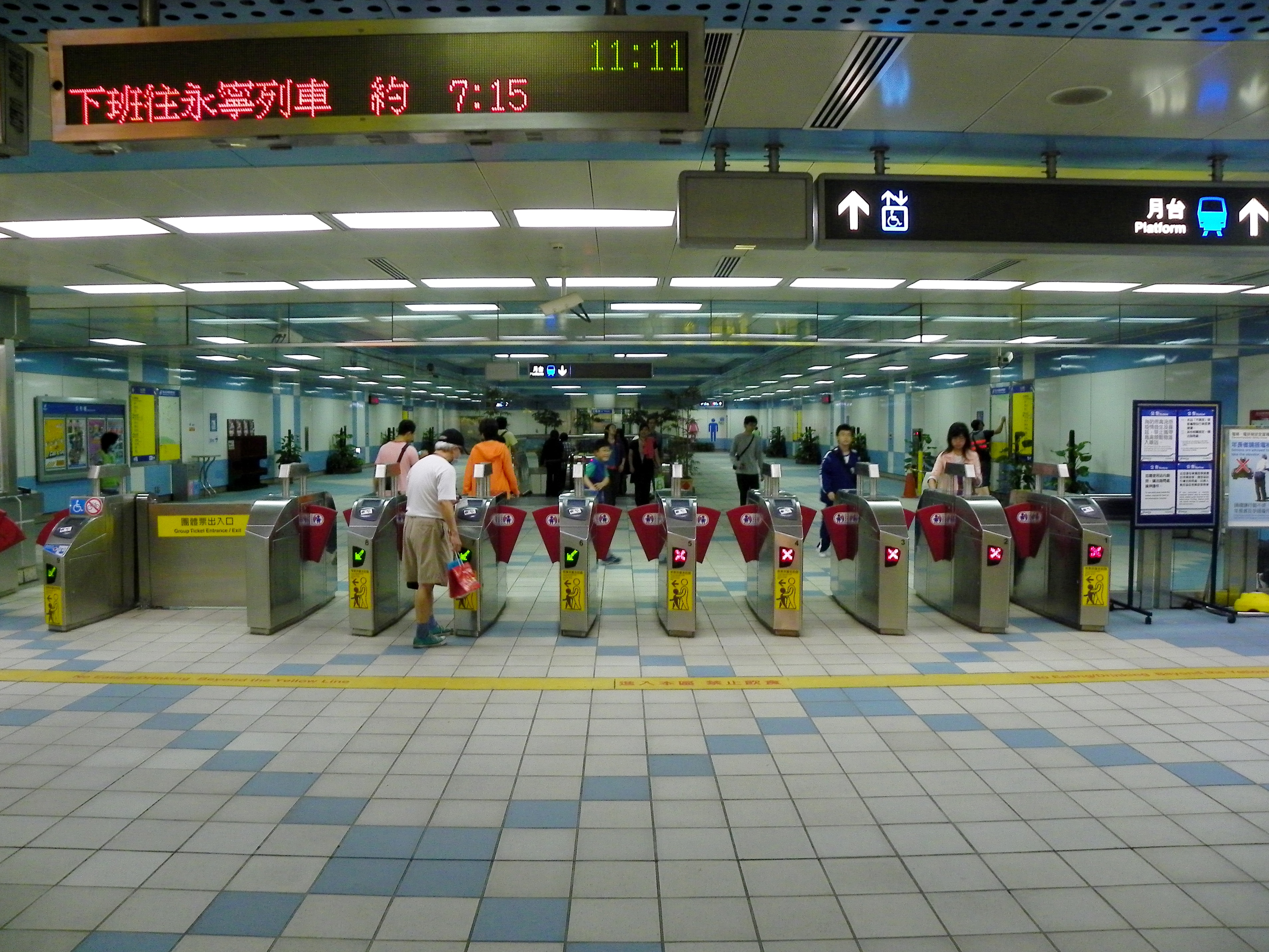 台北捷運土城線海山駅の改札口前。